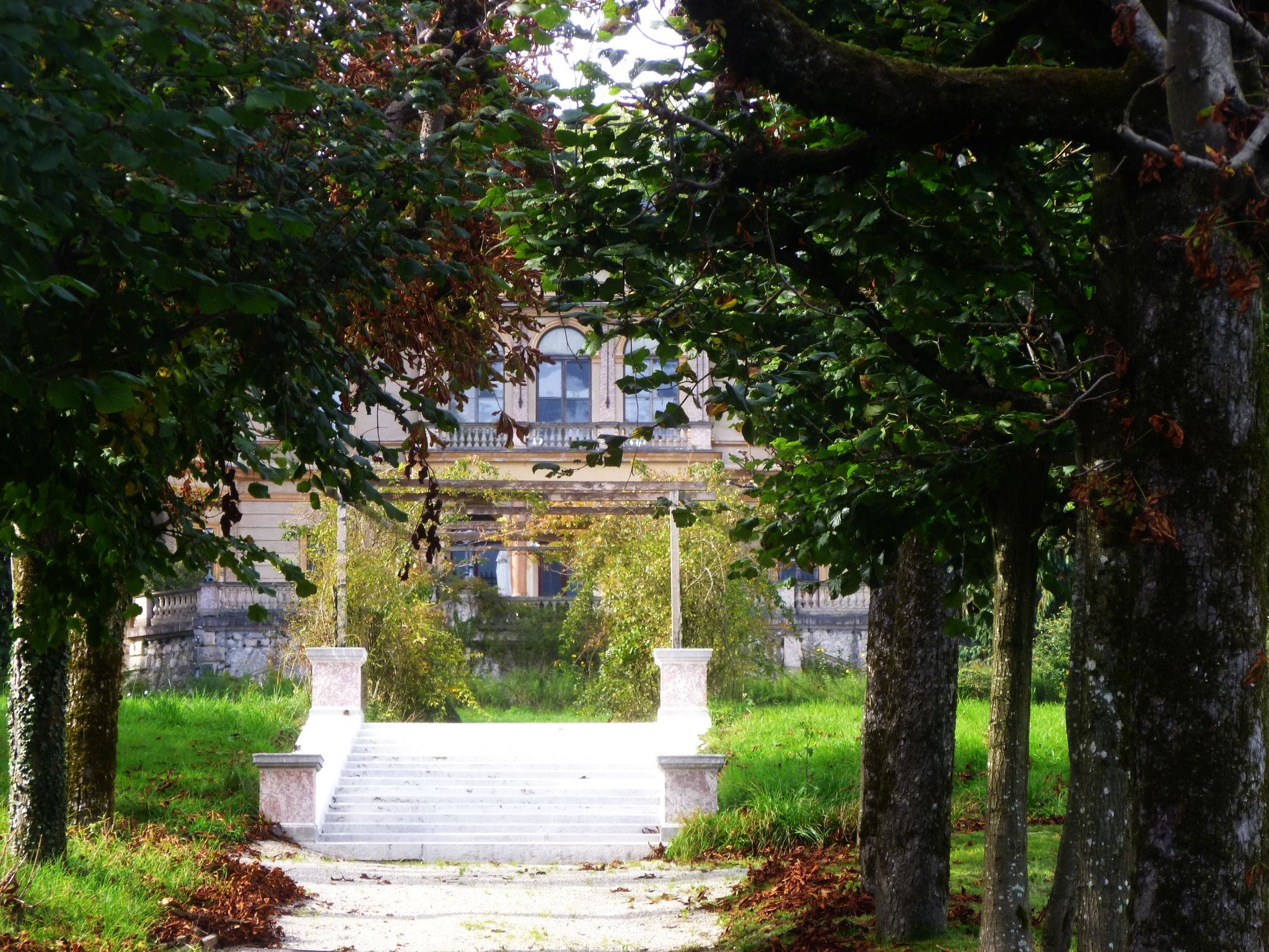 Villa Lanna (Hauptgeb., Gartenpavillon, Park)